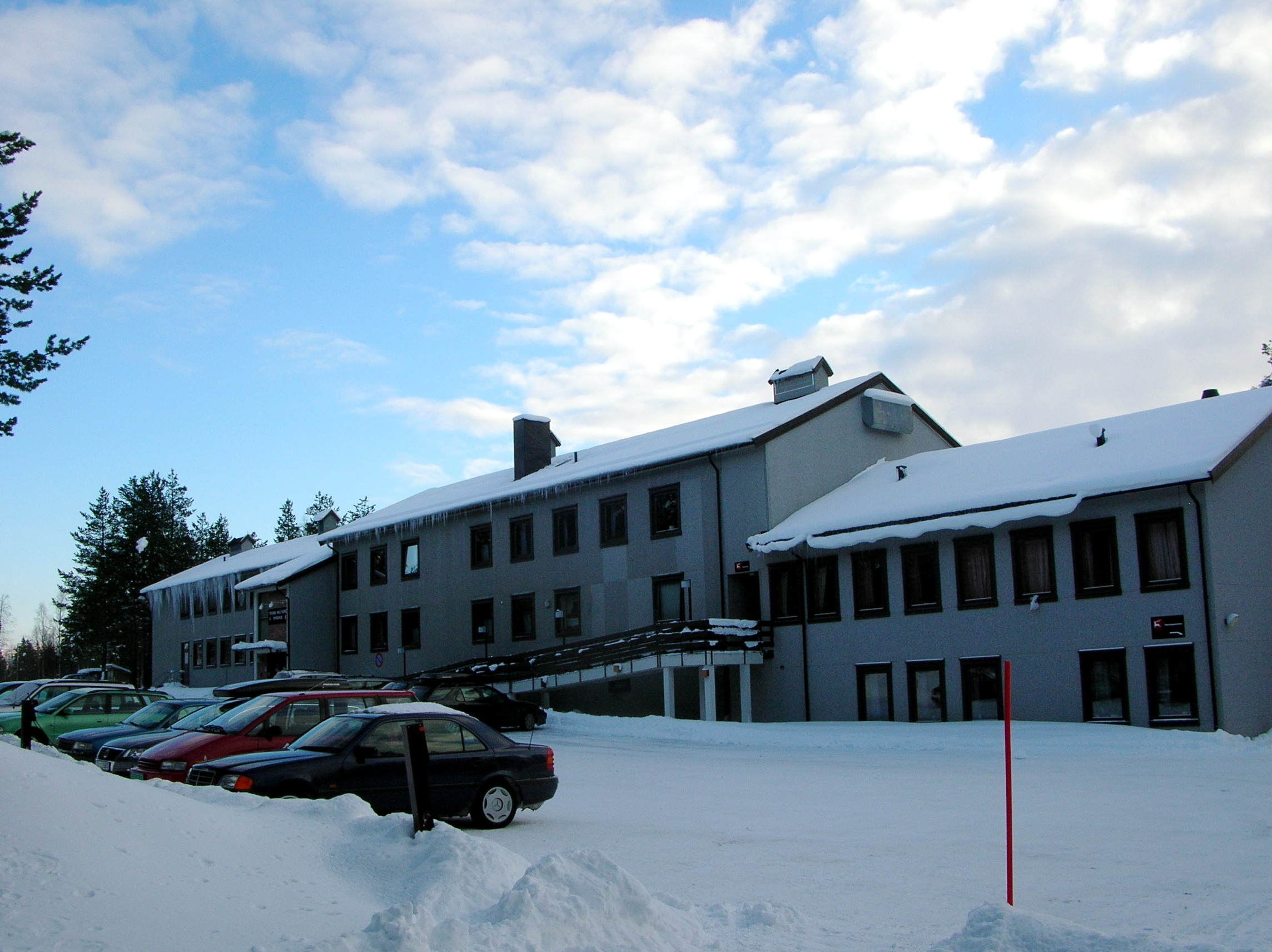 Troms militære sykehus' hovedbygg